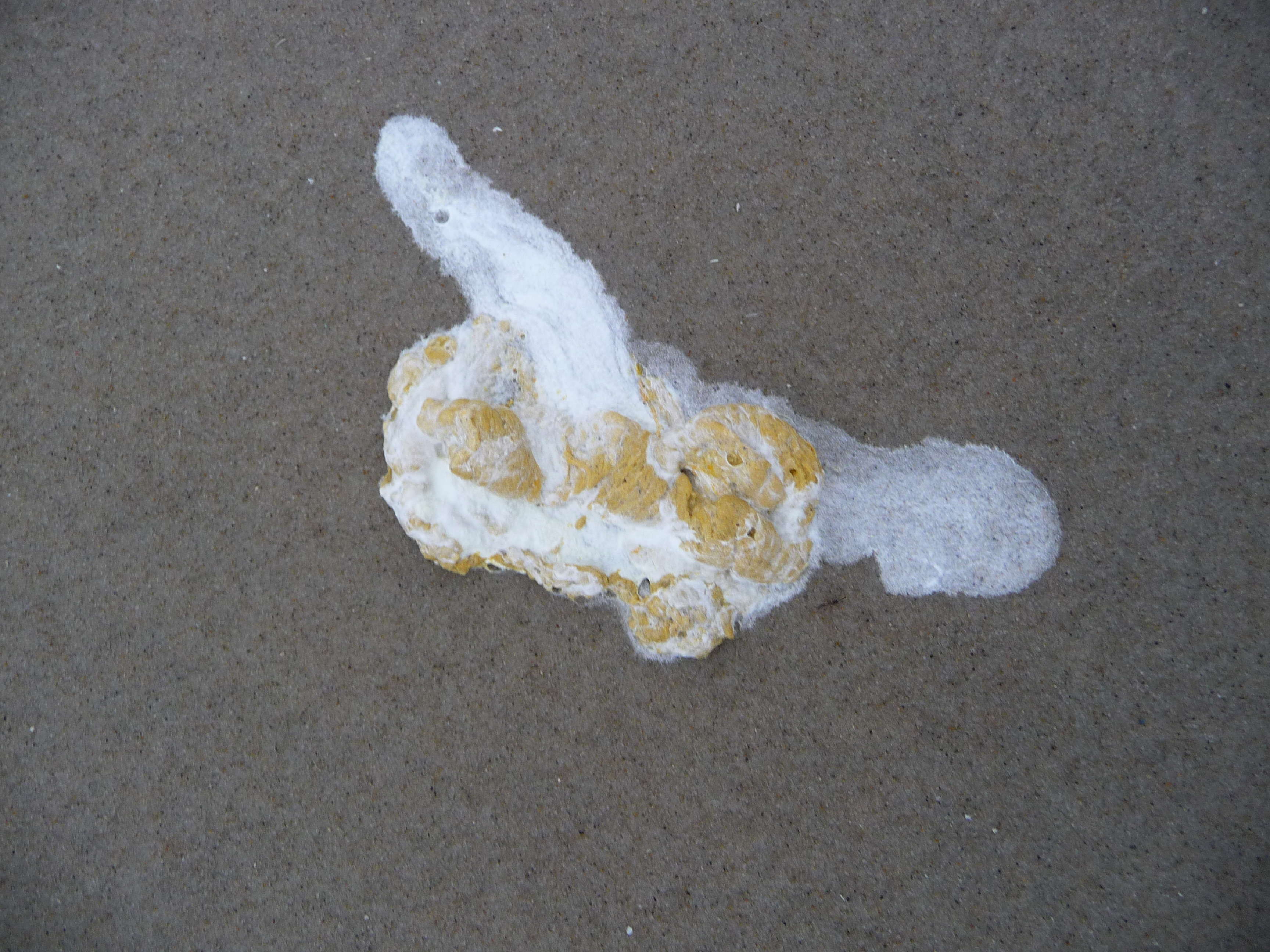 Möwenkot im Niedersächsischen Wattenmeer (Insel Juist, Deutschland)